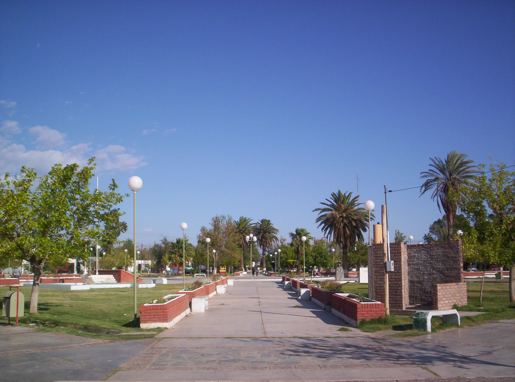 Plaza principal de la localidad de Media Agua, departamento Sarmiento, provincia de San Juan, Argentina The main square of the town of Media Agua, department Sarmiento, San Juan Province, Argentina